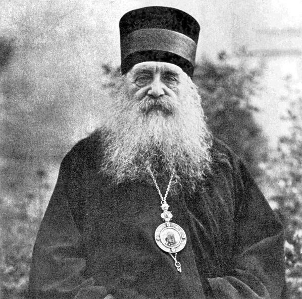 Митрополит Антоний (Храповицкий)